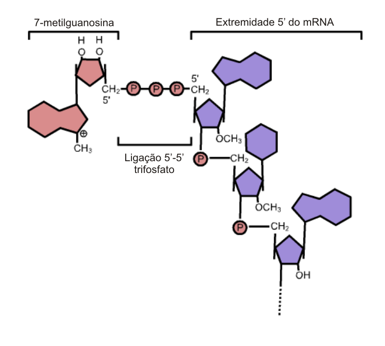 Estrutura Cap 5'